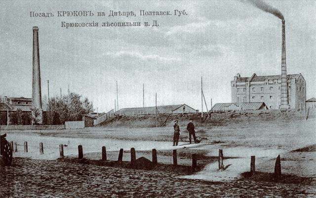 Postcards of old Kremenchuk. Крюківська лісопильня.